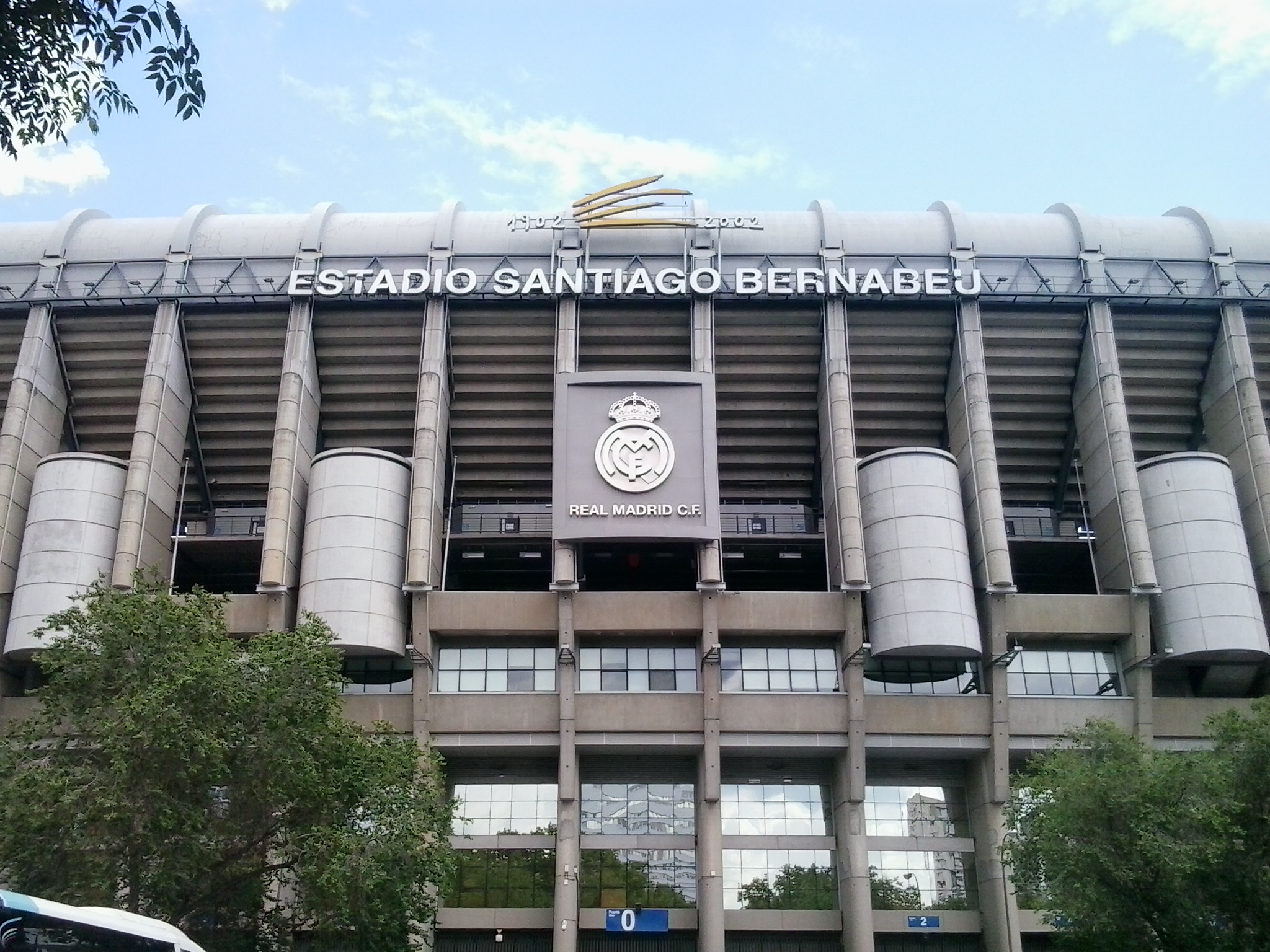 El Lateral Oeste del Estadio Santiago Bernabéu.